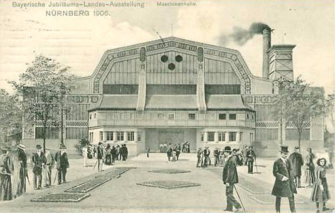 Maschinenhalle (später Luitpoldhalle) auf dem Ausstellungsgelände der Bayerischen Jubiläums-Landes-Ausstellung 1906. Später entstand hier das Reichsparteitagsgelände der Nationalsozialisten. In diesem Zusammenhang wurde die Halle umgestaltet. Die Luitpoldhalle wurde 1945 bei einem Bombentreffer zerstört. 1950 wurde die Ruine abgetragen. Auf dem Fundament befindet sich heute ein Parkplatz, nur die Treppenanlagen sind noch erhalten.